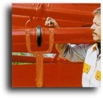 חיבור צנרת.התמונה באדיבות Putzmeister . את האישור ניתן למצוא כאן.